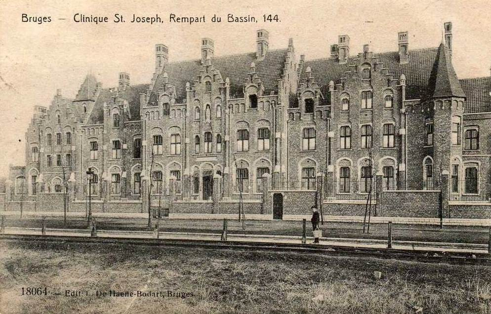 la Clinique Saint Joseph au "rempart du Bassin" (Komvest) à Bruges vers 1911.